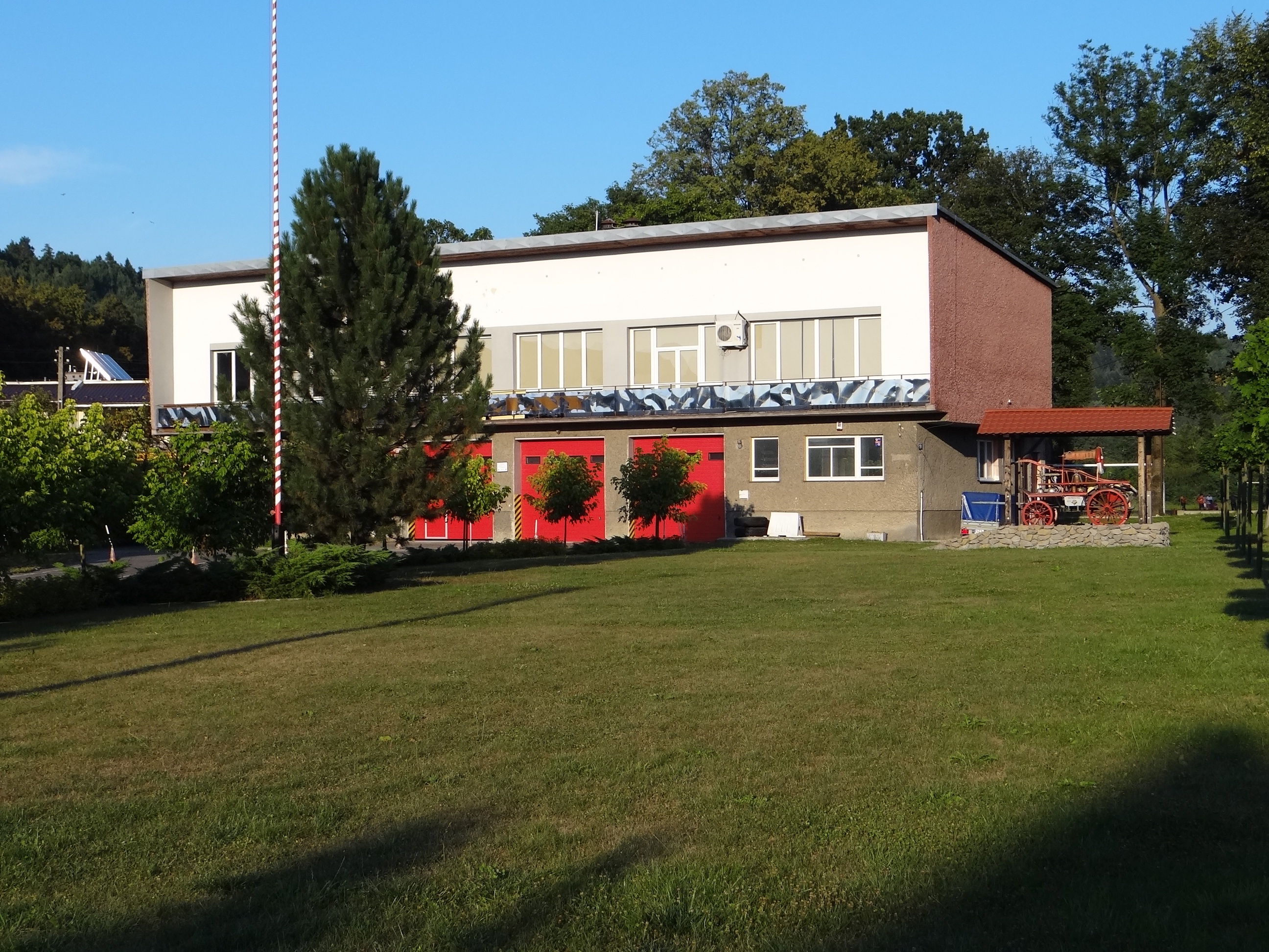 Remiza w Zembrzycach